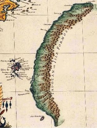 台灣東部被視為化外或界外之地，因而未繪入